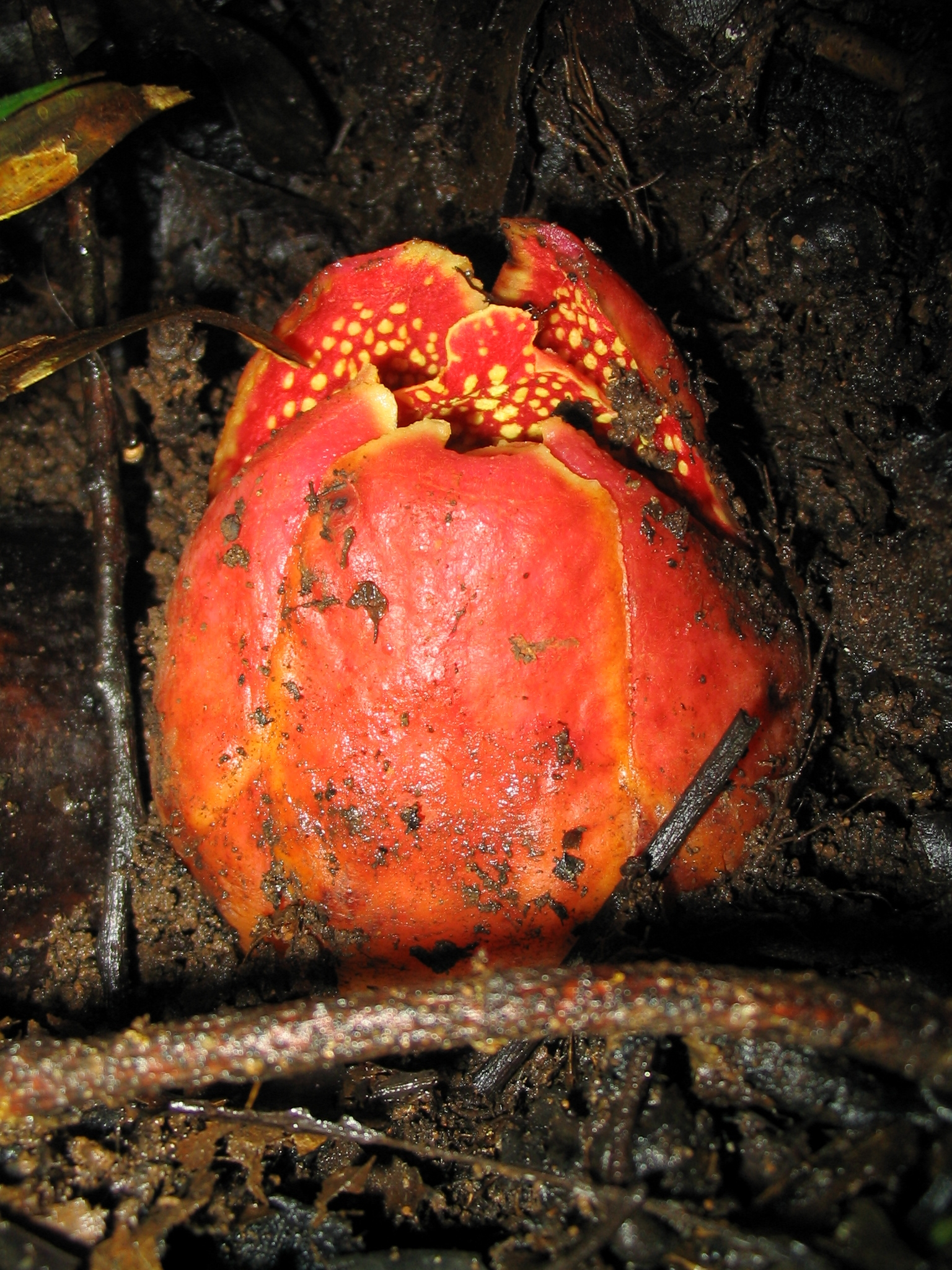 Sapria himalayana in situ